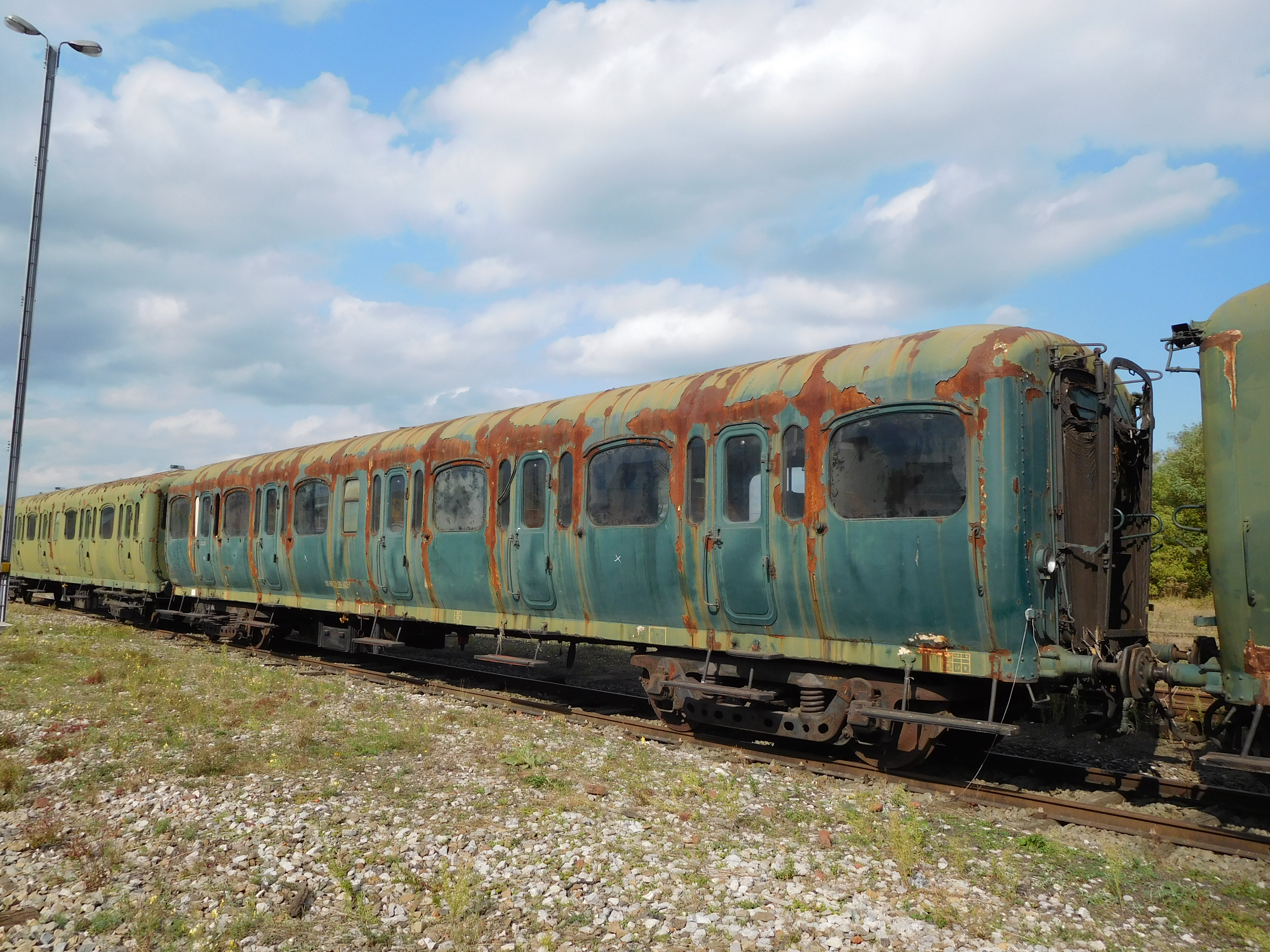 Voiture N de la SNCB en attente de restauration à Mariembourg